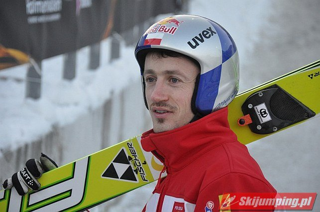 Adam Małysz podczas serii treningowej przed konkursem mężczyzn na skoczni dużej w ramach Mistrzostw Świata w Narciarstwie Klasycznym 2011 w Oslo.